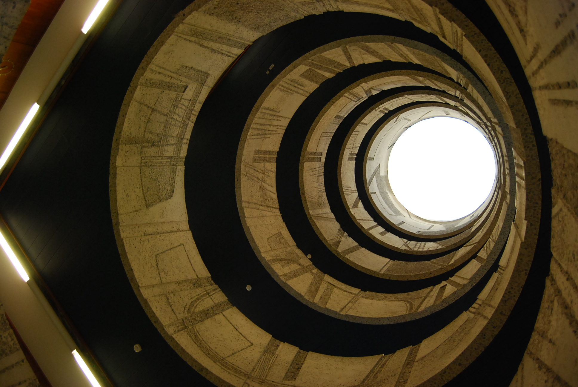 Å se opp fra rotunden opp i lyssjaktet i NVE-huset er en spennende opplevelse. Kunstneren Odd Tandberg har brukt ornamenter som løper oppigennom etasjene. Dato: 23.02.2009